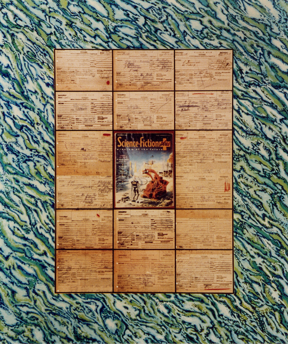 Hans-Peter Klie: Sience Fiction. 1979. Öl und Collage auf Nessel